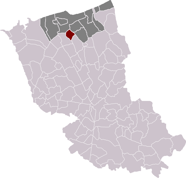 Locatie gemeente Kapelle (Frans-Vlaanderen) in arrondissement Duinkerke. Zelfgemaakt. Location of Cappelle-la-Grande municipality in the arrondissement of Dunkirk. Self made. Localisation de la commune de Cappelle-la-Grande dans l'arrondissement de Dunkerque. Fait moi-même.